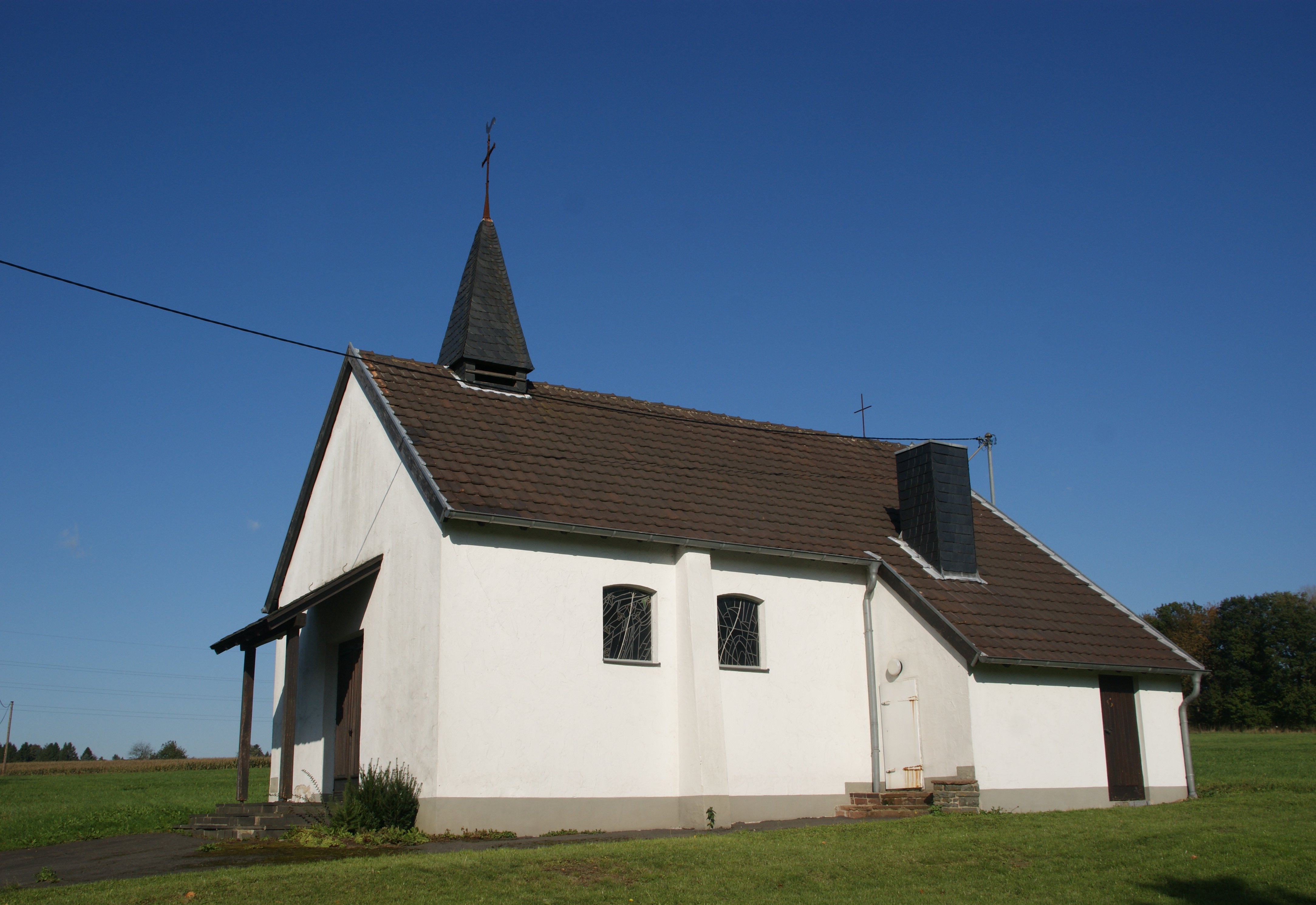 Kapelle „Maria zum Frieden“ in Sandscheid, Königswinter (